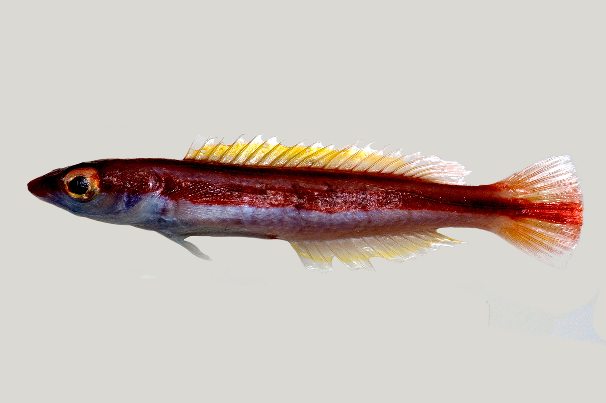 Terelabrus rubrovittatus